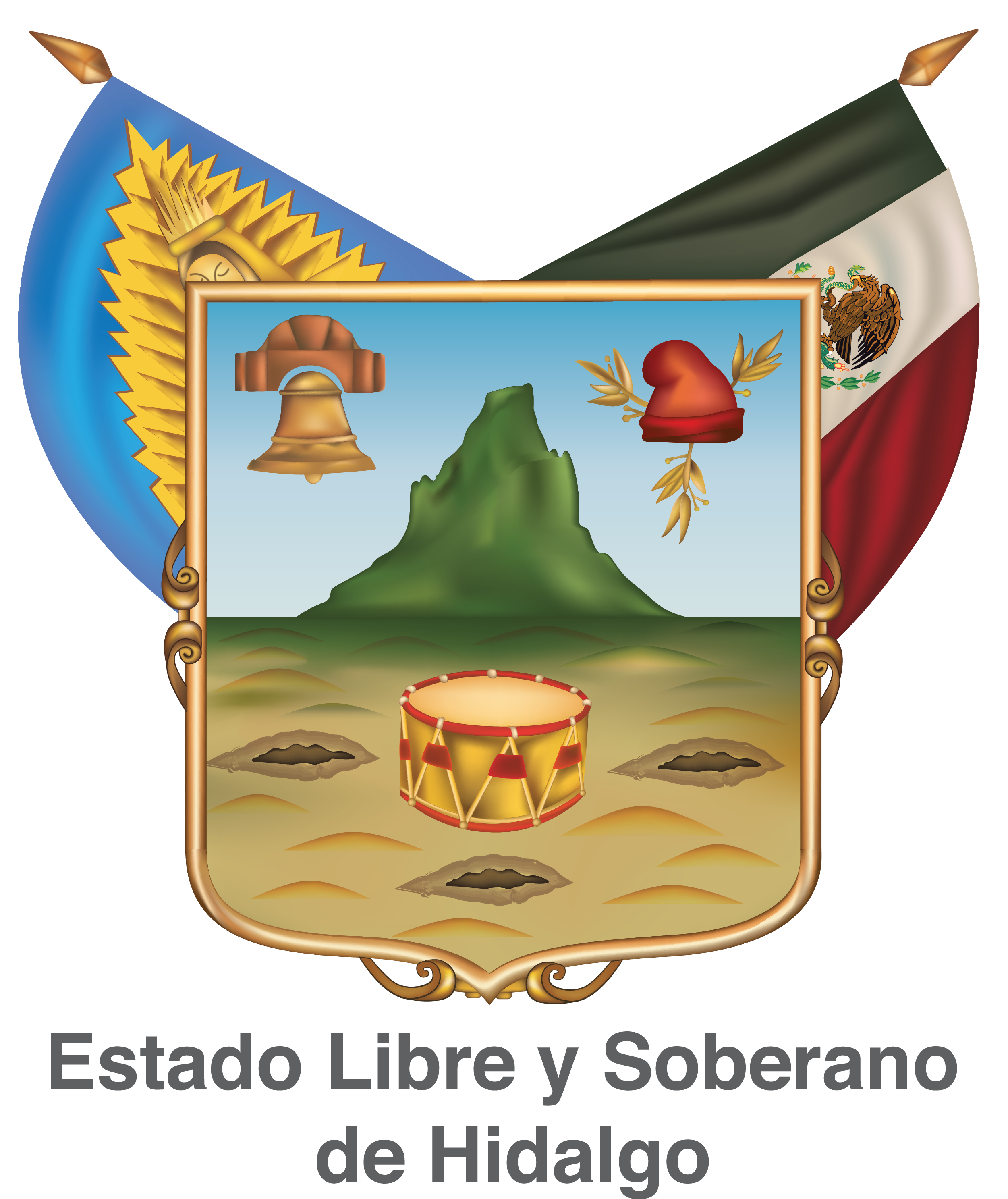 Diseño realizado por el decreto del Gobernador del Estado de Hidalgo, Lic. José Francisco Olvera Ruiz y aprobado por la LXI legislatura del Congreso del Estado Libre y Soberano de Hidalgo. Originalmente diseñado por Diego Rivera, a pedido de José Vasconcelos.